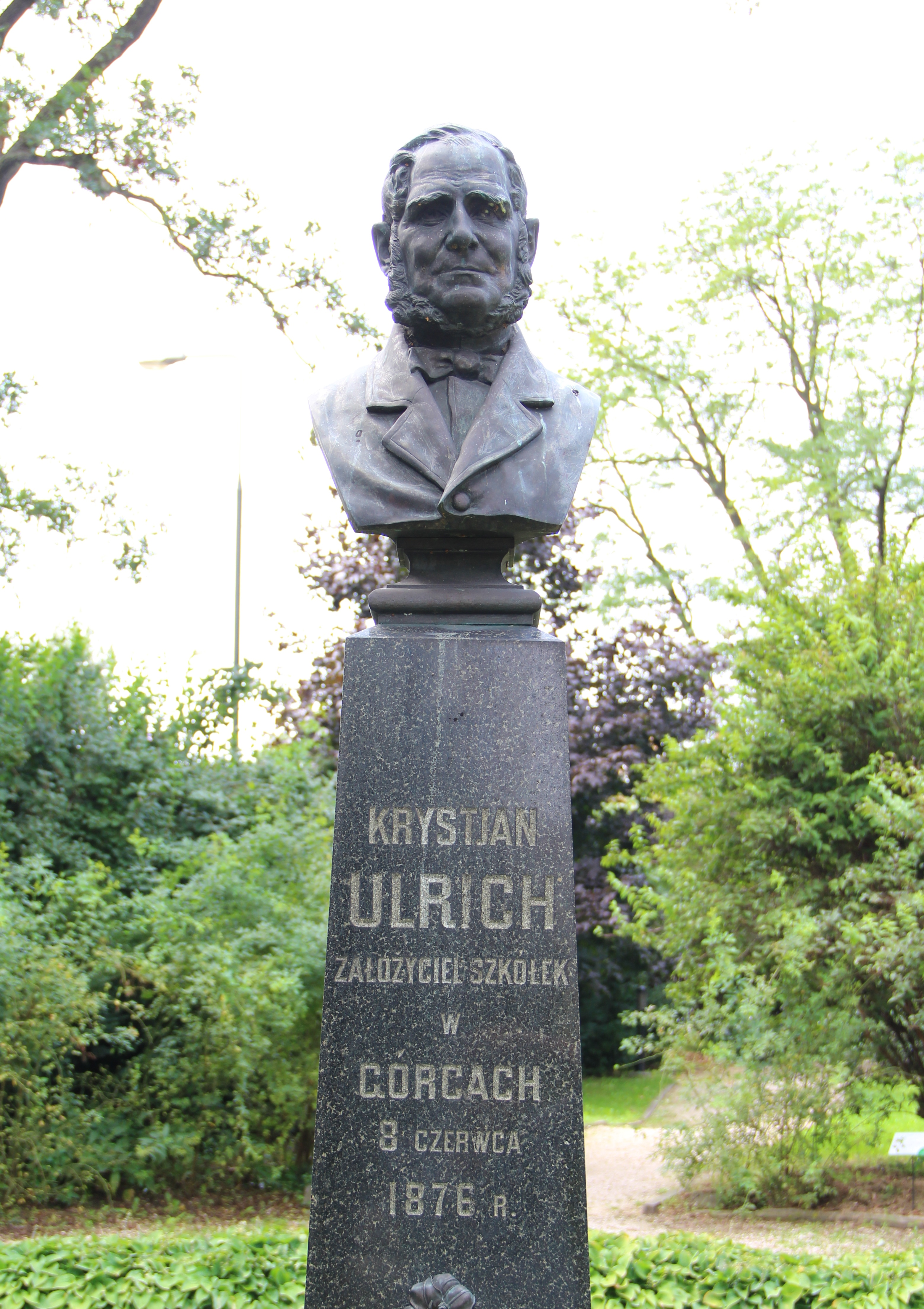 Statue K Ulrich, Wola Park